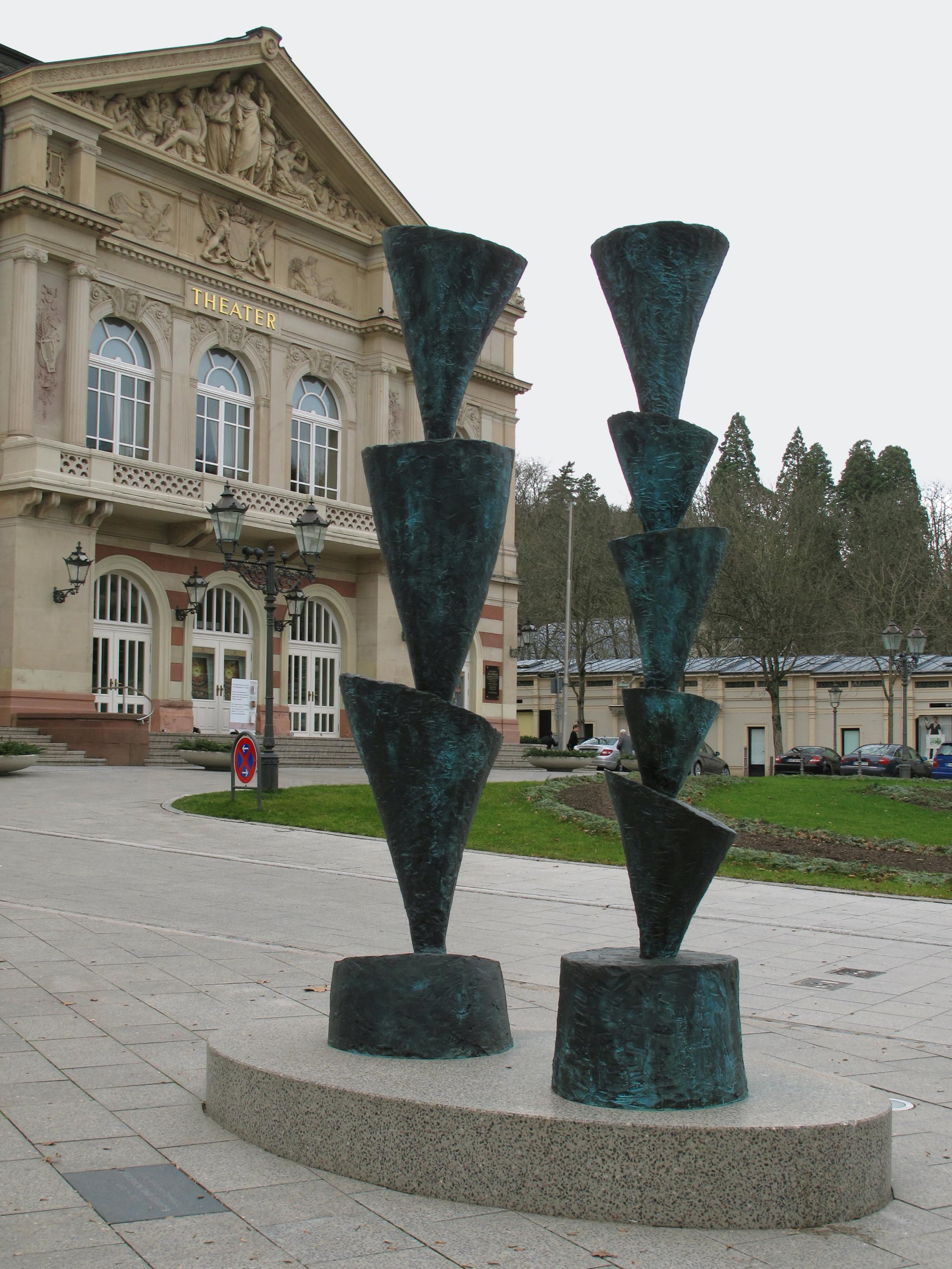 Karl Manfred Rennertz, Philemon und Baucis, 2011, Goetheplatz, - Deutschland, Baden-Württemberg, Baden-Baden